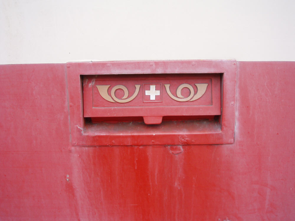 Briefeinwurf an einem ehemaligen Wagen der Waldenburgerbahn